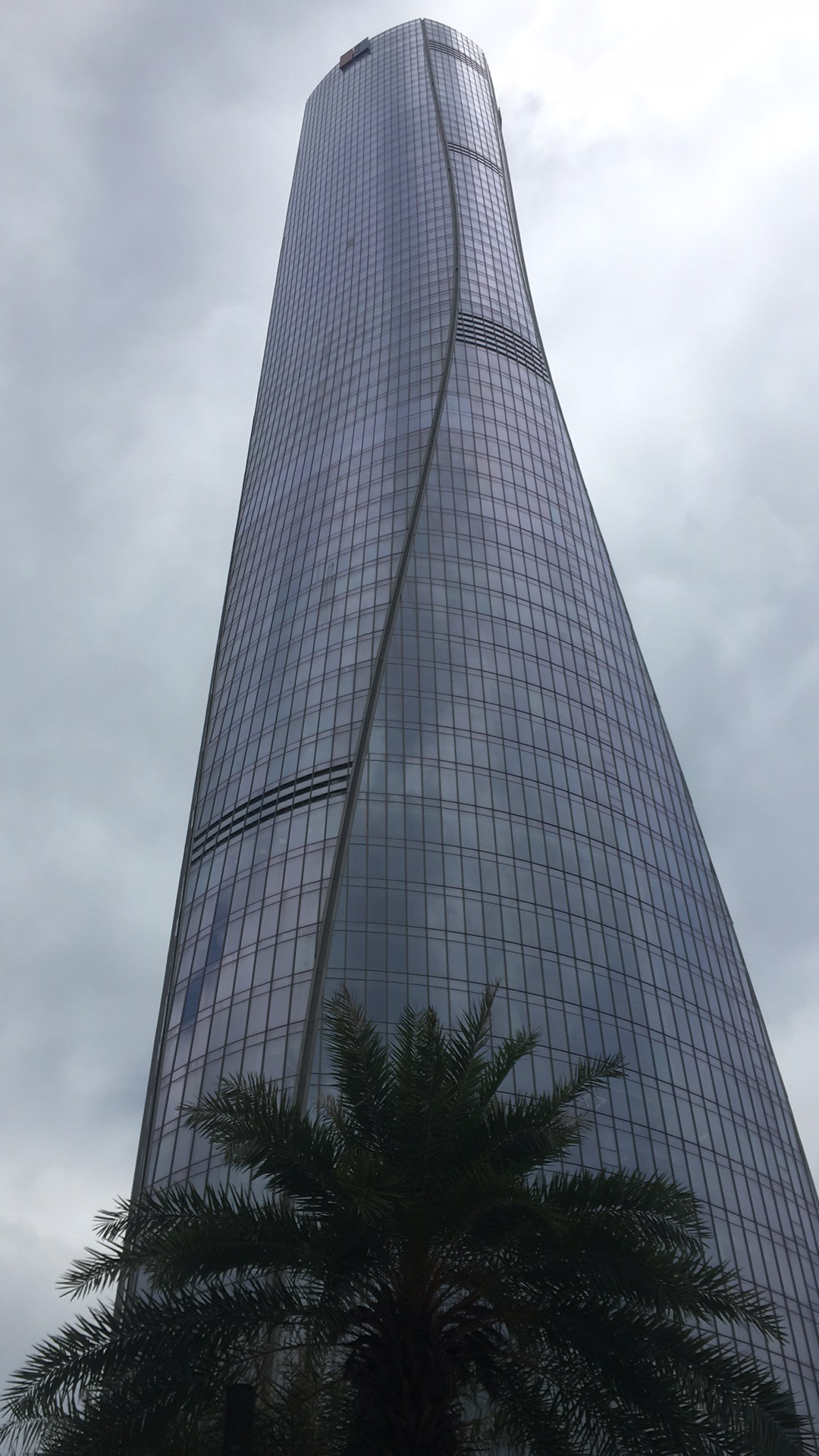 中文（香港）: 珠海中心大厦